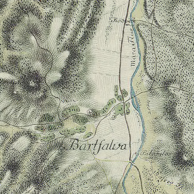 Harta Iozefină a Ungariei, 1782-1785, fragment: satul Berbești în Maramureș.